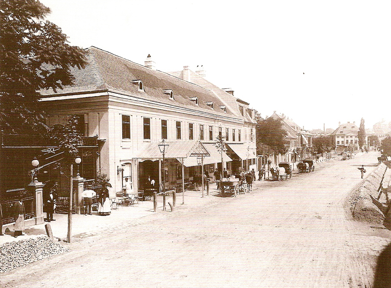 Hietzinger Hauptstraße 10-14 in Wien-Hietzing, 1889. Im Bild das "Dommayersche Kasino", an dessen Stelle 1907 das Parkhotel Schönbrunn errichtet wurde.